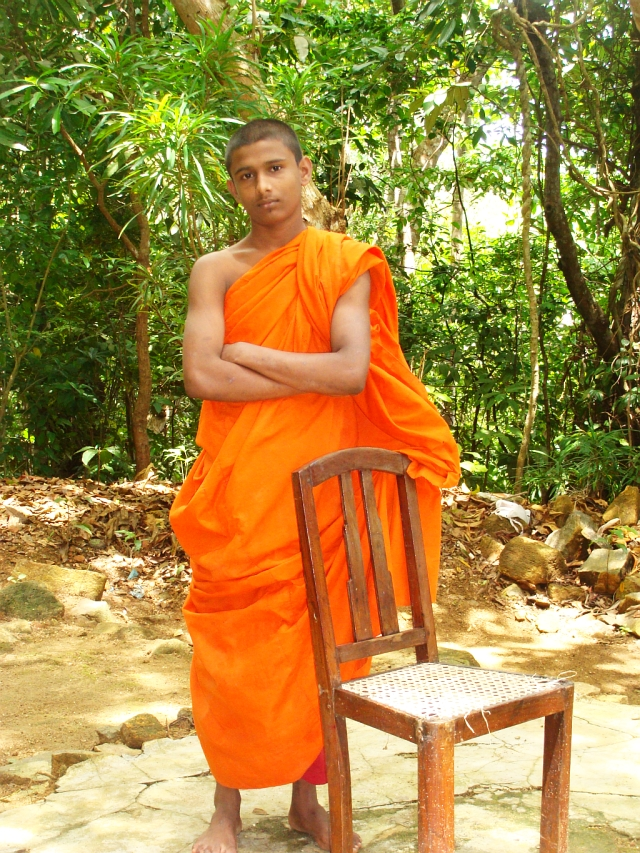 Ein buddhistischer Mönch in Galle